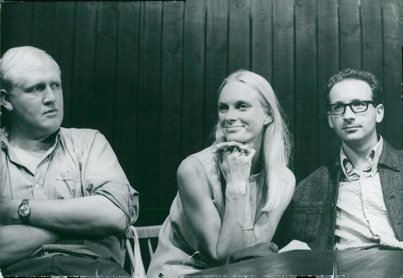 Bildtext: "Teaterchefen Allan Edwall samlade på tisdagen Scala-teaterns ensemble inför höstsäsongen. Den 18 september slår man upp portarna för första gången med 'Sången om Skråpuken' på repetroaren [sic]. På bilden Björn Gustafsson och Lena Brundin lyssnande under Edwalls genomgång. Till höger regissören Etienne Glaser." Bilden användes i Svenska Dagbladet 1968-12-19 (s. 20).